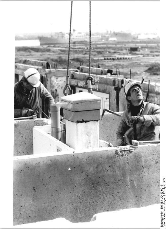 Rostock, Bauarbeiter Ferrtigteile montierend ADN-ZB Sindermann 17.4.79 Rostock: Gut im Plan liegen die Montagekollektive der Taktstraße 1 im siebenten Rostocker Neubaugebiet, in Groß-Klein. Die Rostocker Bauleute schließen mit diesem bauabschnitt die letzte Lücke auf einem 460 Hektar großen Gelände zwischen dem alten Stadtgebiet und Wernemünde. Somit entsteht mit Groß-Klein ein weiteres Wohnzentrum im Nordwesten Rostocks, wo bereits 90.000 Einwohner leben. -siehe auch U 0417-14N